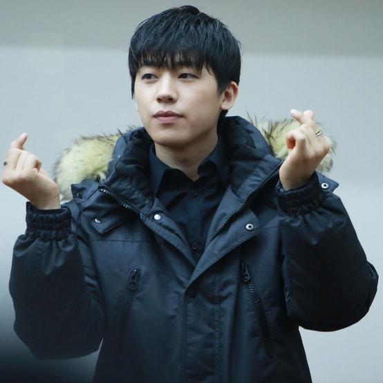 151226 創造 音樂中心 迷你粉絲見面會 조선말: 151226 음중 창조 미니팬미팅